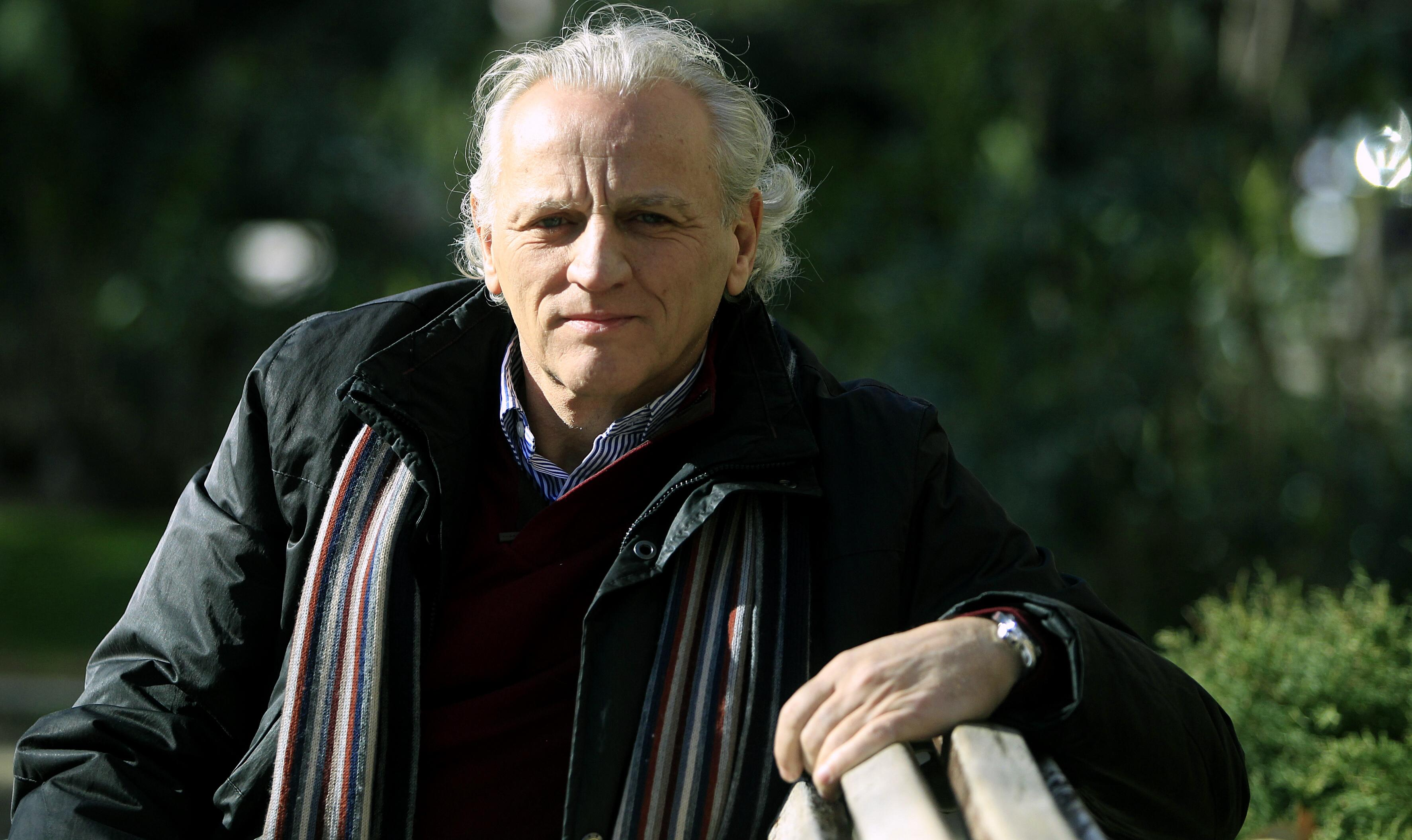 El periodista publica Palabras de doble filo, una recopilación de sus columnas en El País. Hablamos de lingüística y, necesariamente, también de manipulación, del uso del silencio o de cómo las palabras afectan a la realidad (o viceversa)